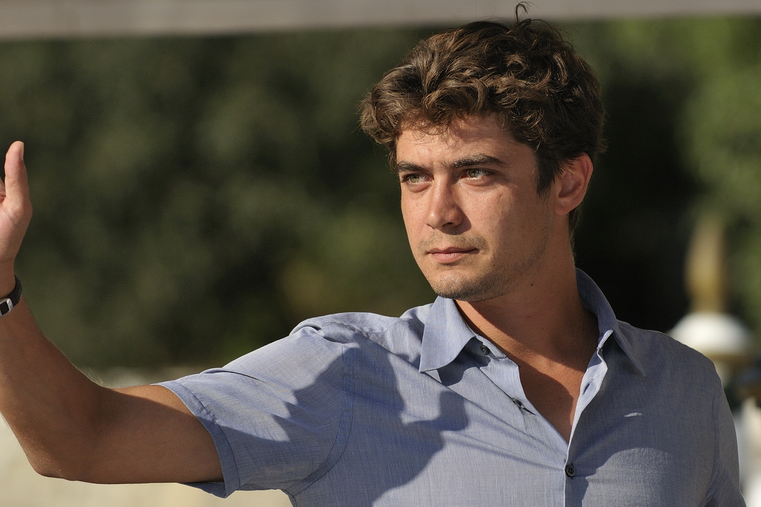 66ème Festival du Cinéma de Venise (Mostra), 6ème jour (07/09/2009)